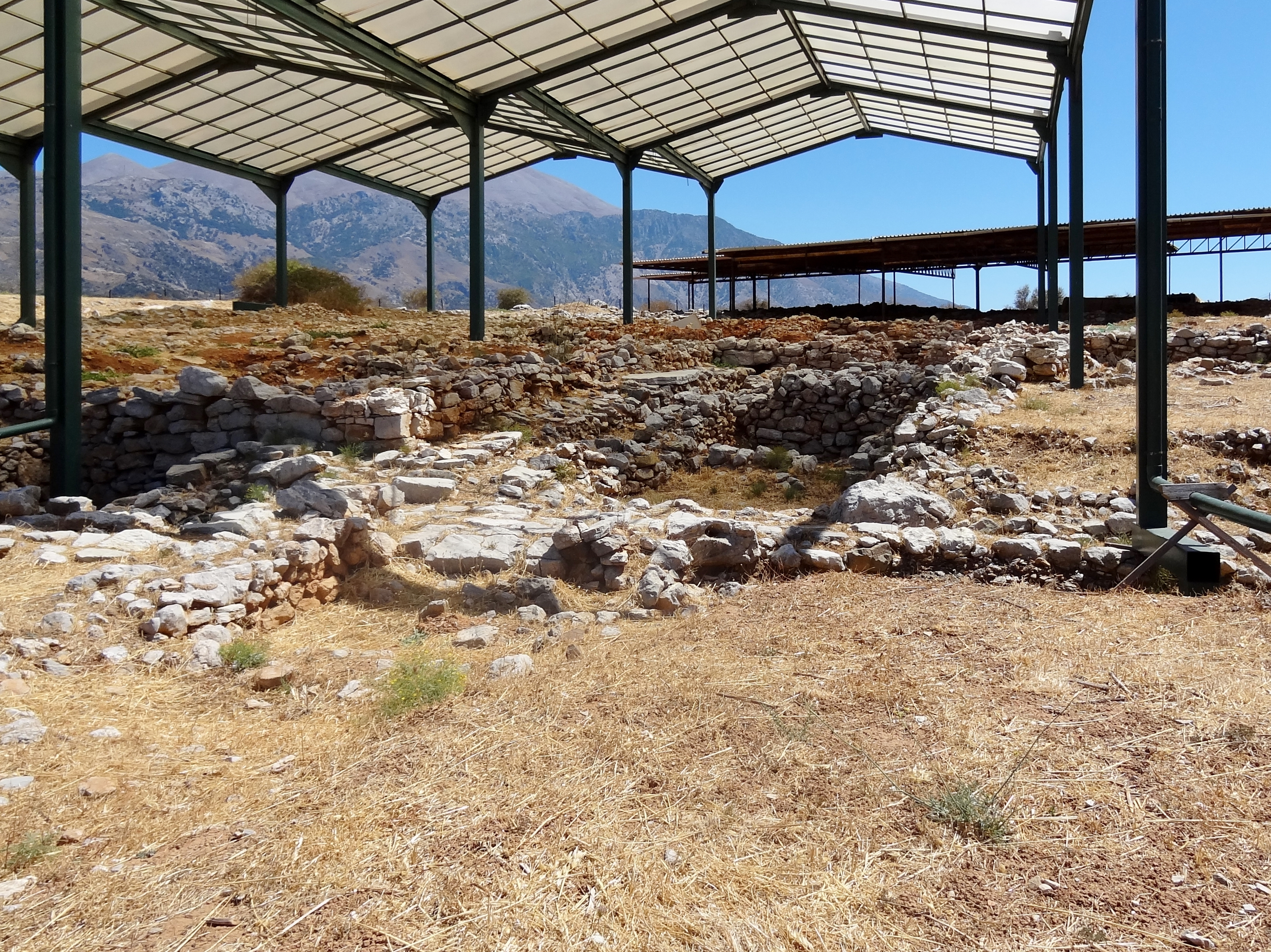 Archäologische Ausgrabungsstätte von Monastiraki (Μοναστηράκι), Gemeinde Amari, Regionalbezirk Rethymno, Kreta, Griechenland